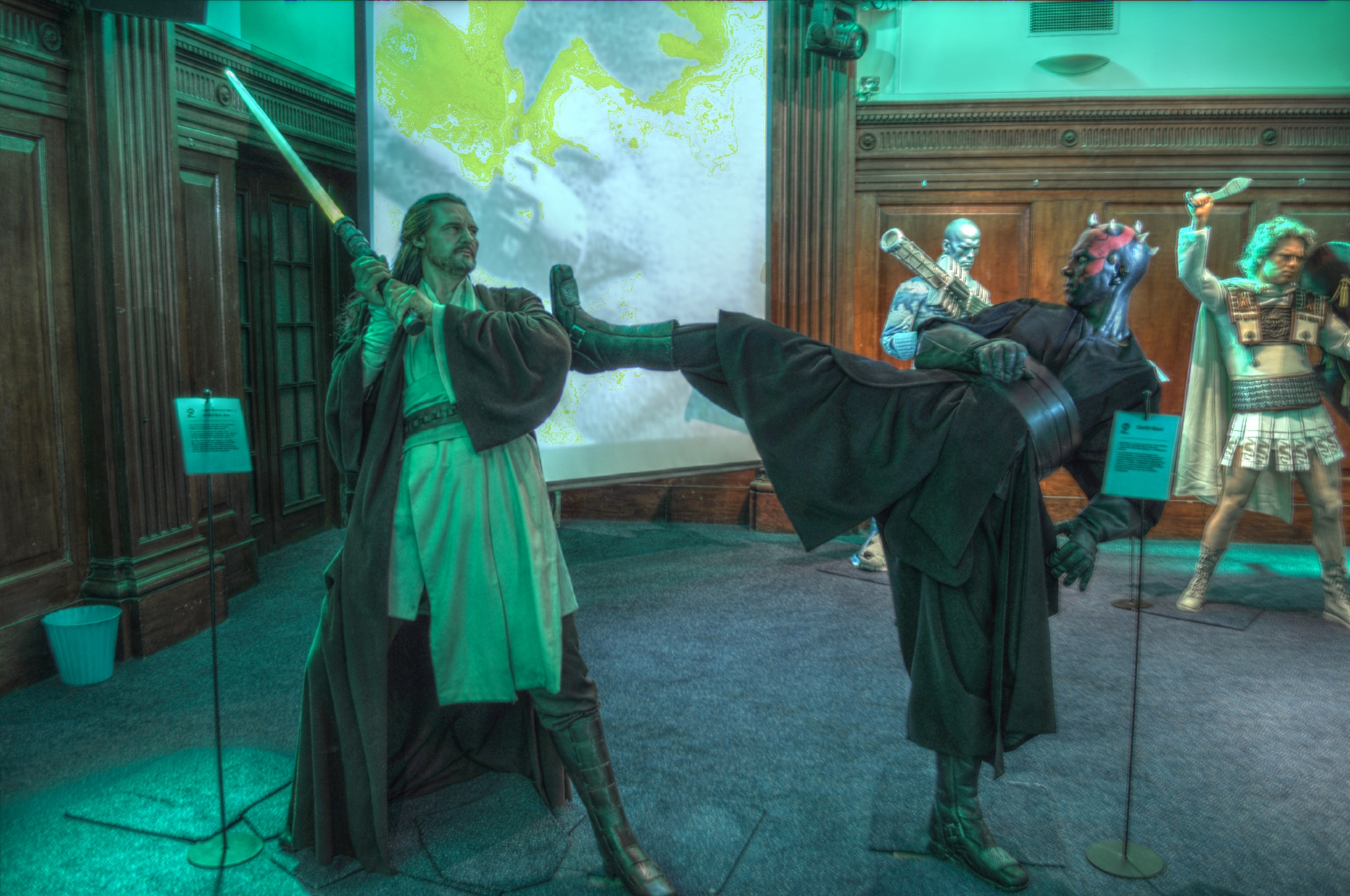 Camera: Nikon D5000 Luminance HDR, Mantiuk '06